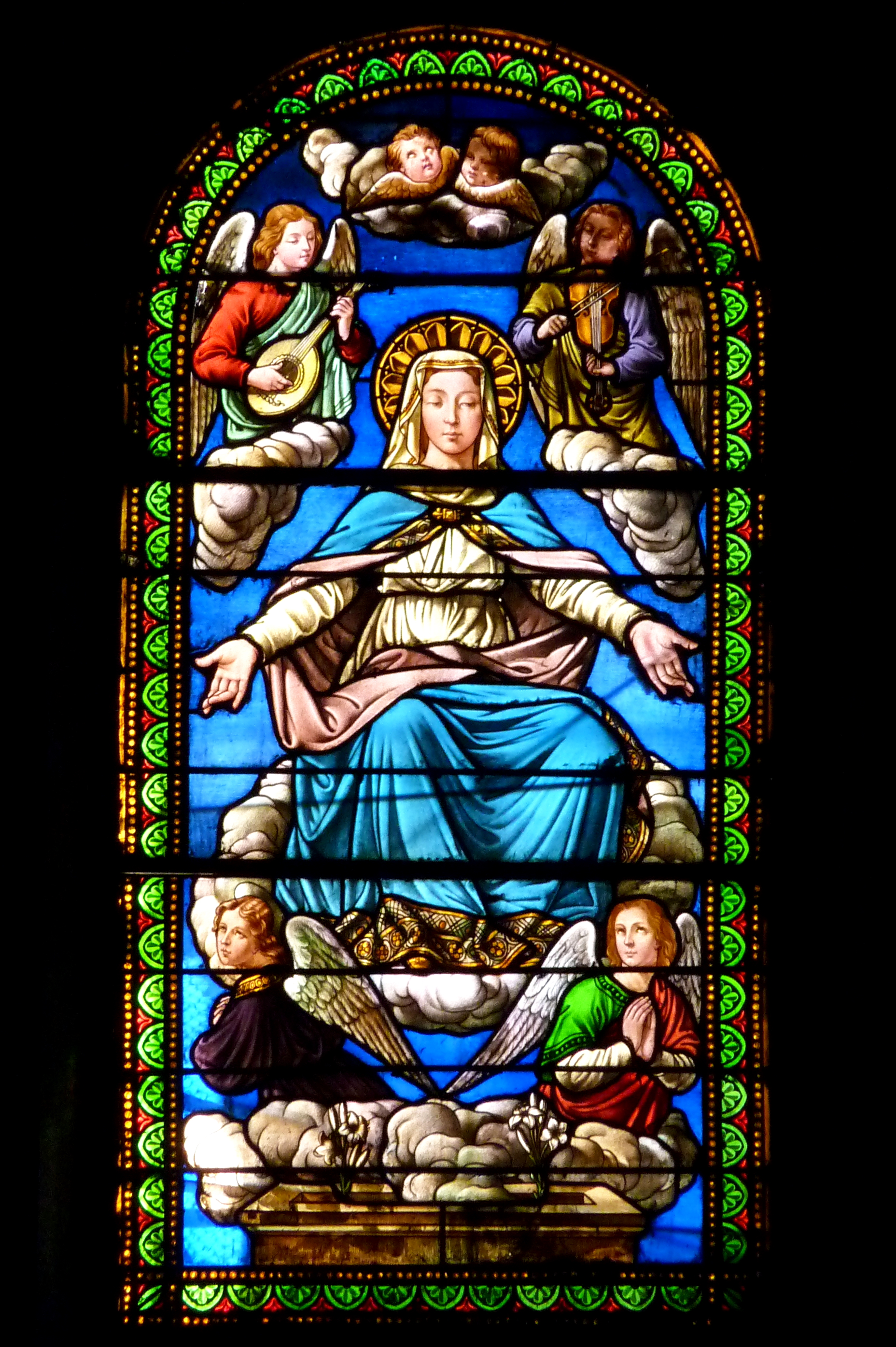 Bleiglasfenster in der Kirche von Châteauneuf-du-Pape, Darstellung: Mariä Himmelfahrt